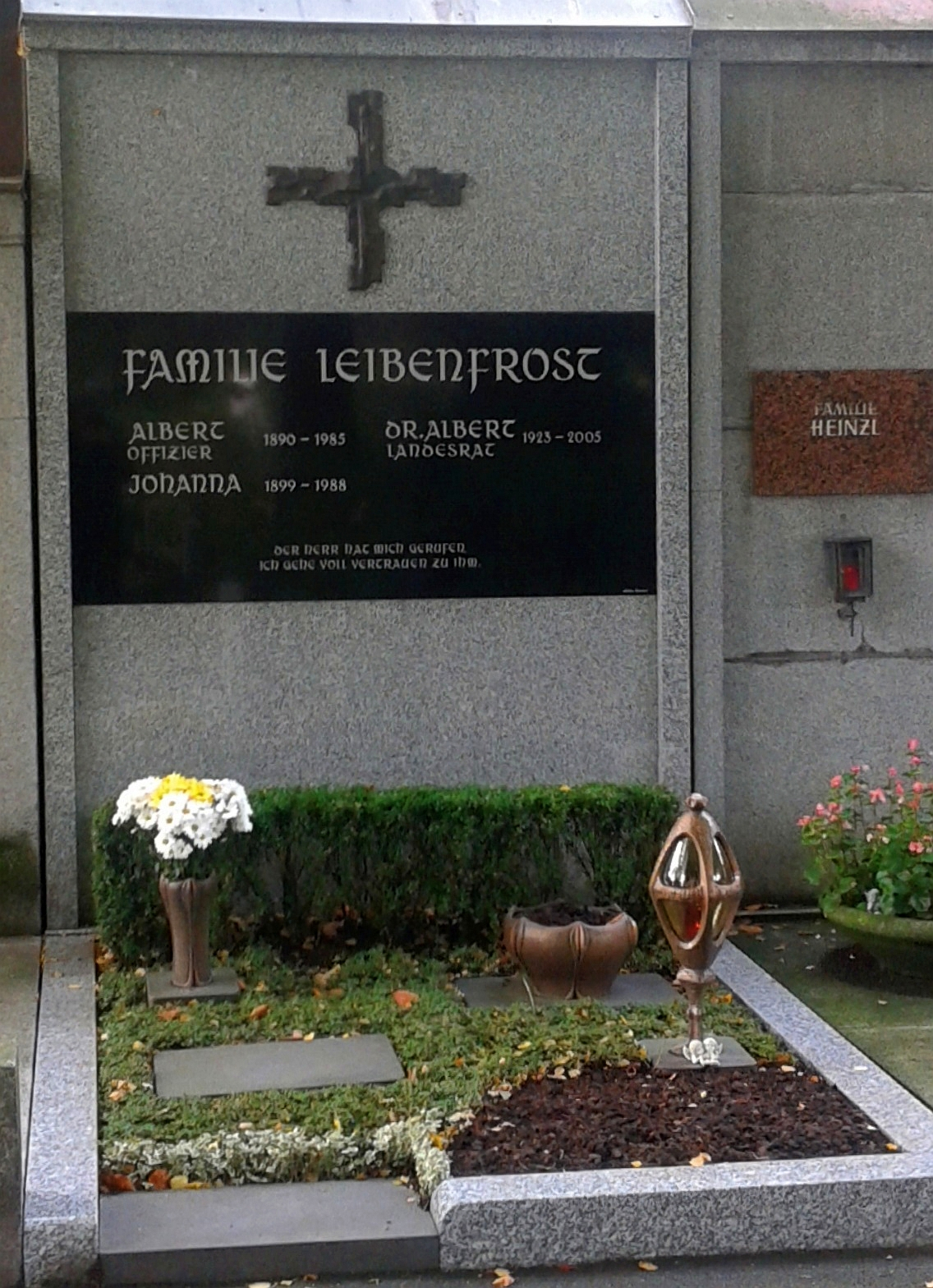 St. Barbara-Friedhof Linz - Grab von Landesrat Albert Leibenfrost und Familie